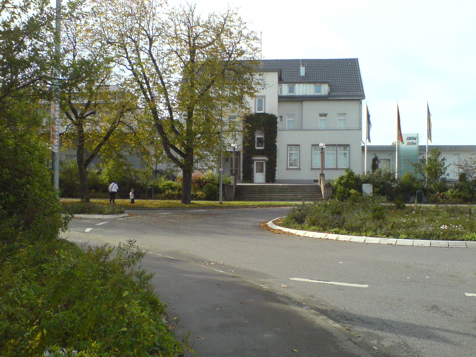 Blick von der Trossinger Hauptstraße zum Bahnhof , Bild selbst erstellt, 22.10.2006, Christian Meyer-Oldenburg